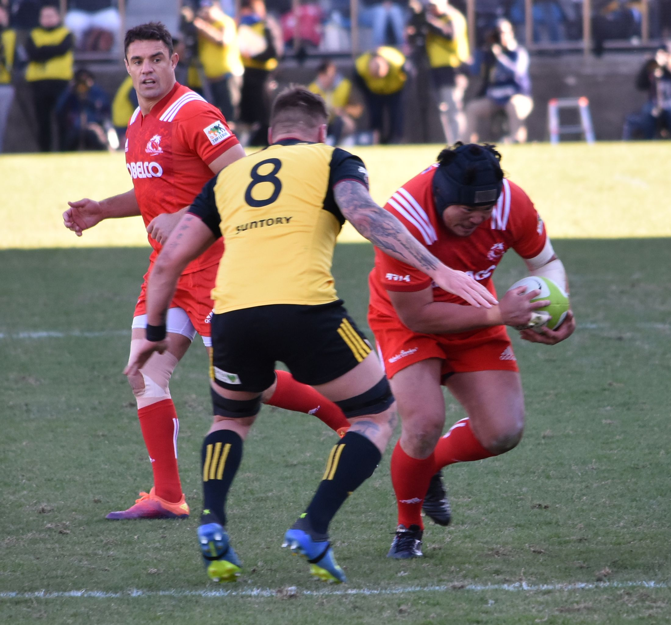 山下 裕史